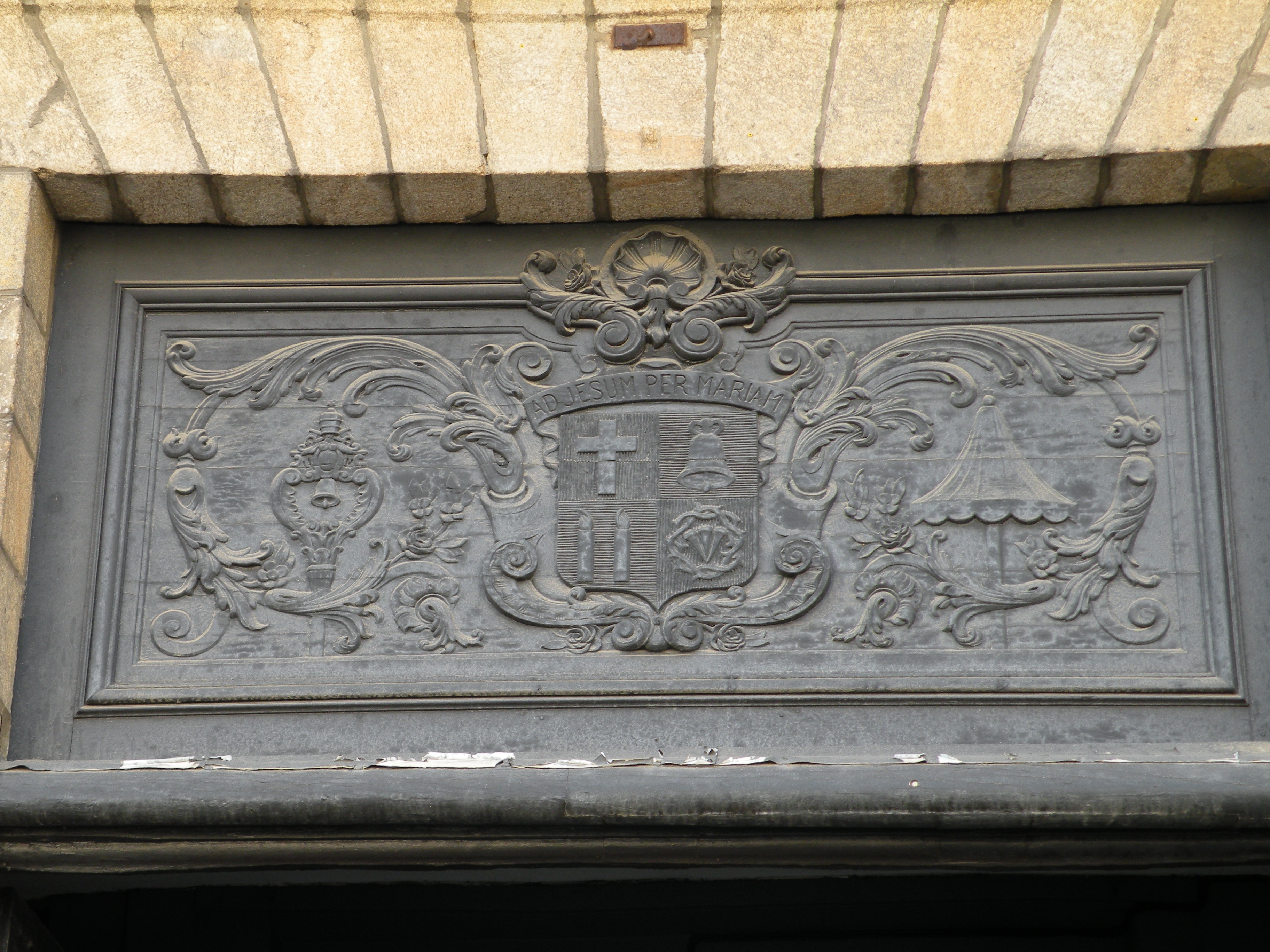 La Basilique Saint-Sauveur de Rennes : fronton de l'entrée principale.